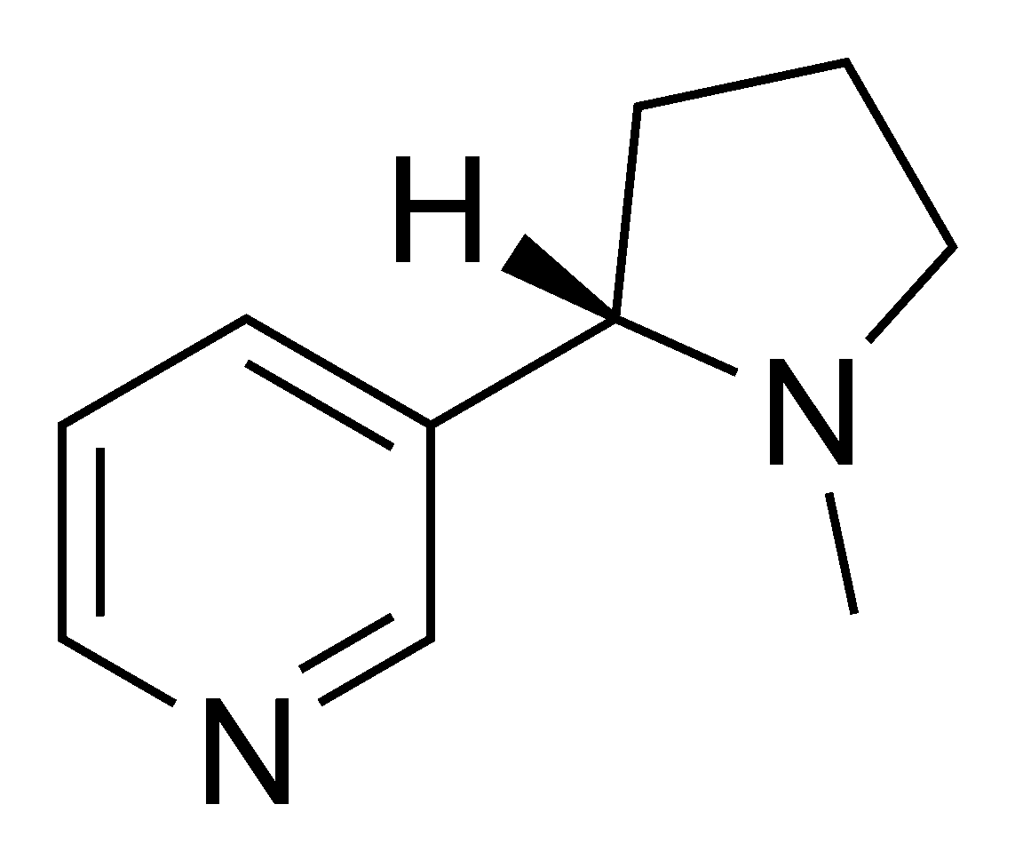 Nicotine